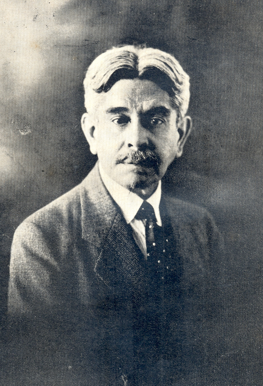 El escritor salvadoreño Vicente Alberto Masferrer Mónico (1868-1932).